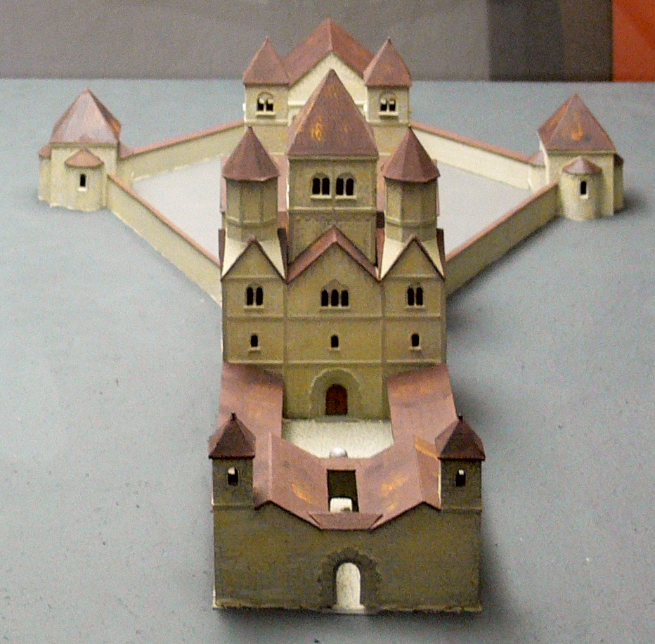 Schaffhausen, Museum zu Allerheiligen, Dauerausstellung zur Klostergeschichte Modell des ersten Münsters